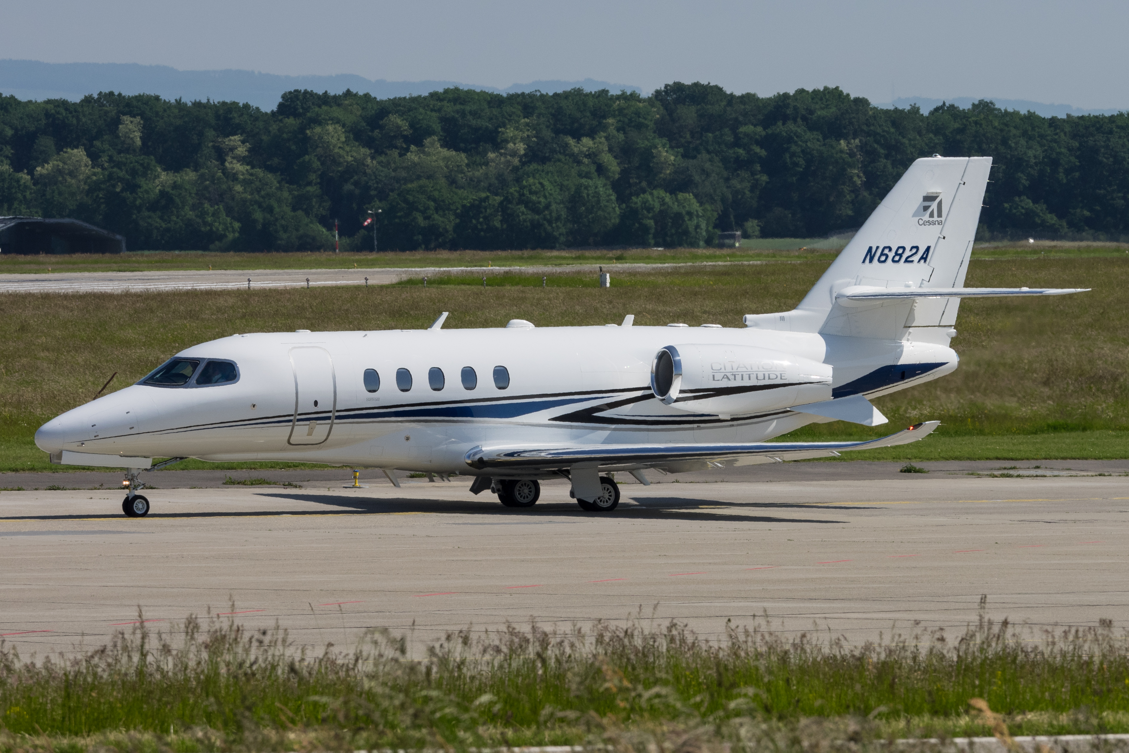 GVA 22.05.2015